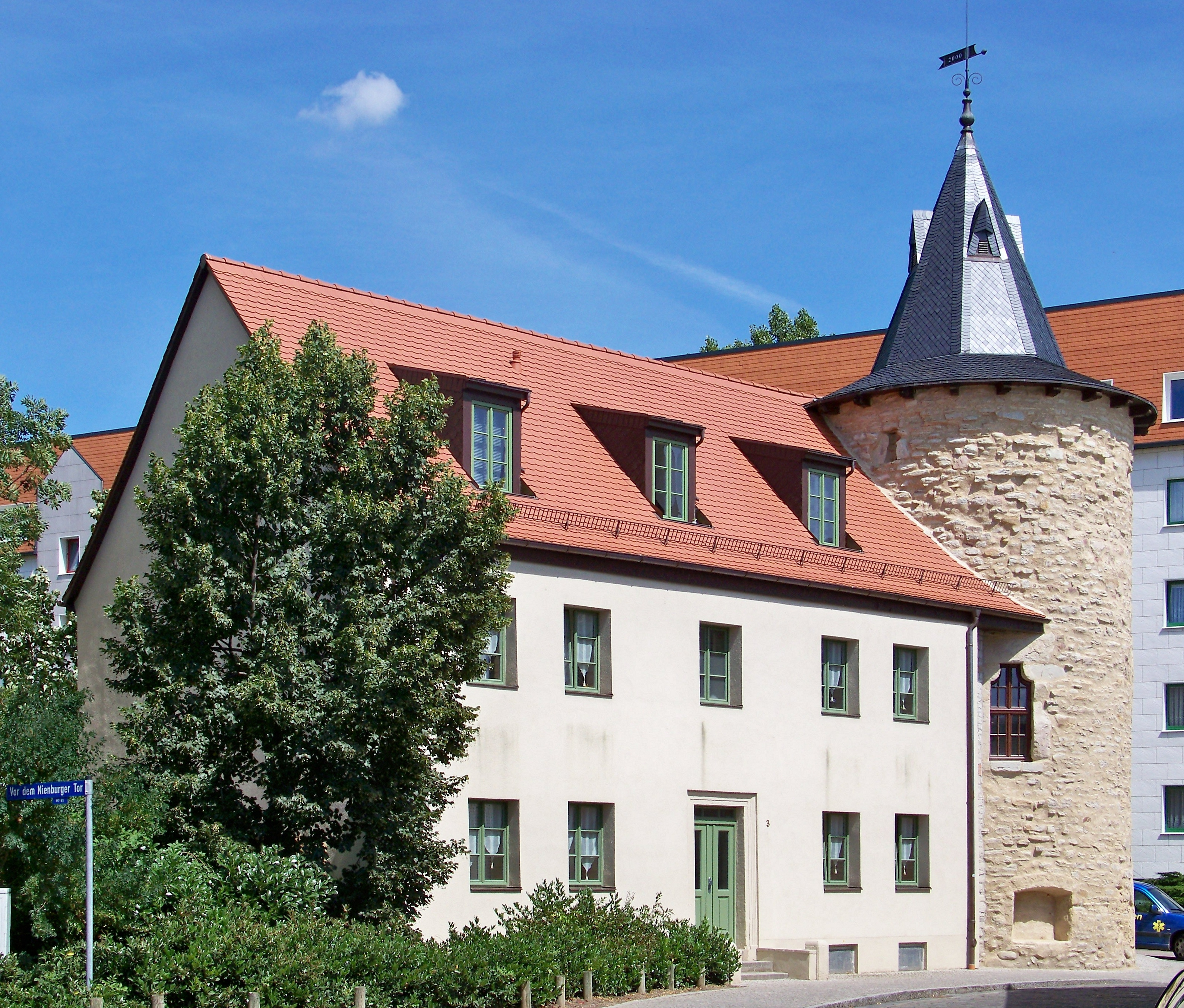 Hasenturm in Bernburg (Saale)